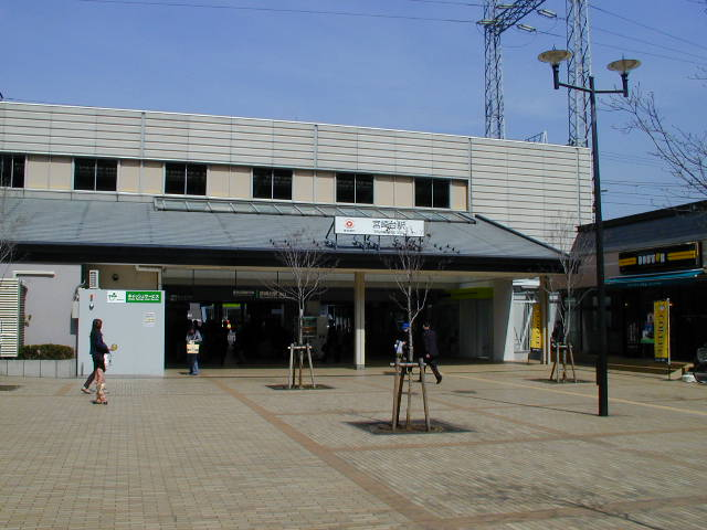 Miyazakidai-Sta